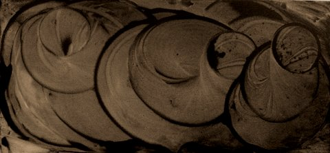 ללא כותרת,2001,אקריליק על בד,150 70ס"מ